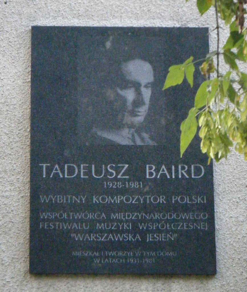 Tablica upamiętniająca Tadeusza Bairda. Warszawa, Saska Kępa, ul. Lipska 11.